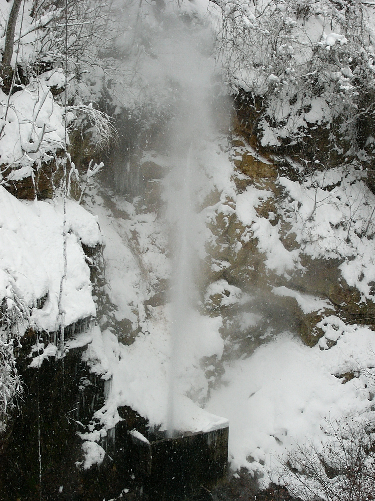 川俣温泉間欠泉